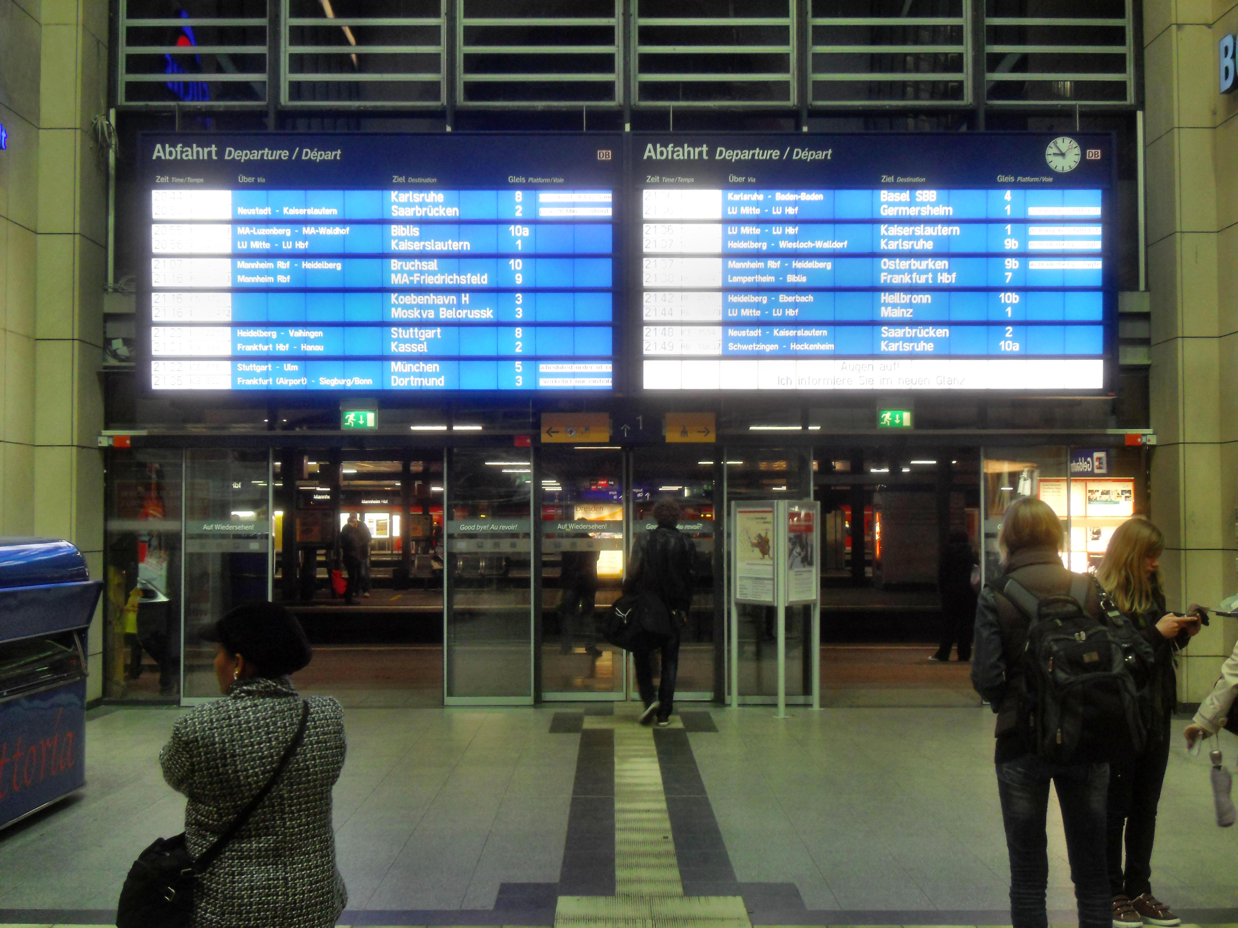 Die Empfangshalle des Mannheimer Hauptbahnhofs in Baden-Württemberg (Deutschland)